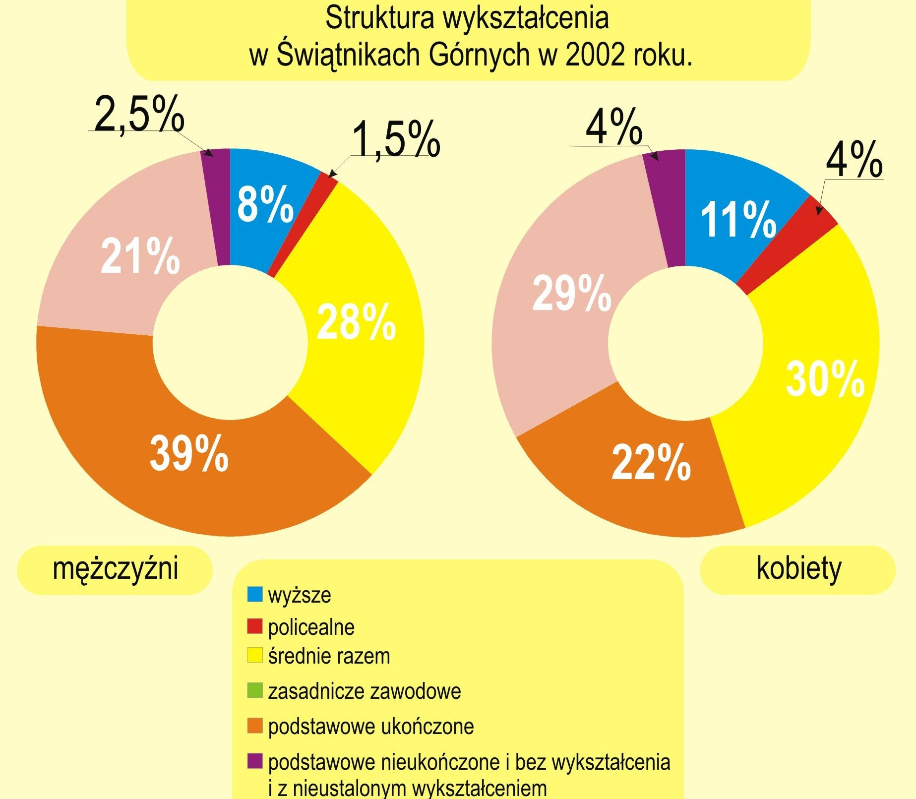 Struktura Wykształcenia w swiatnikach gornych